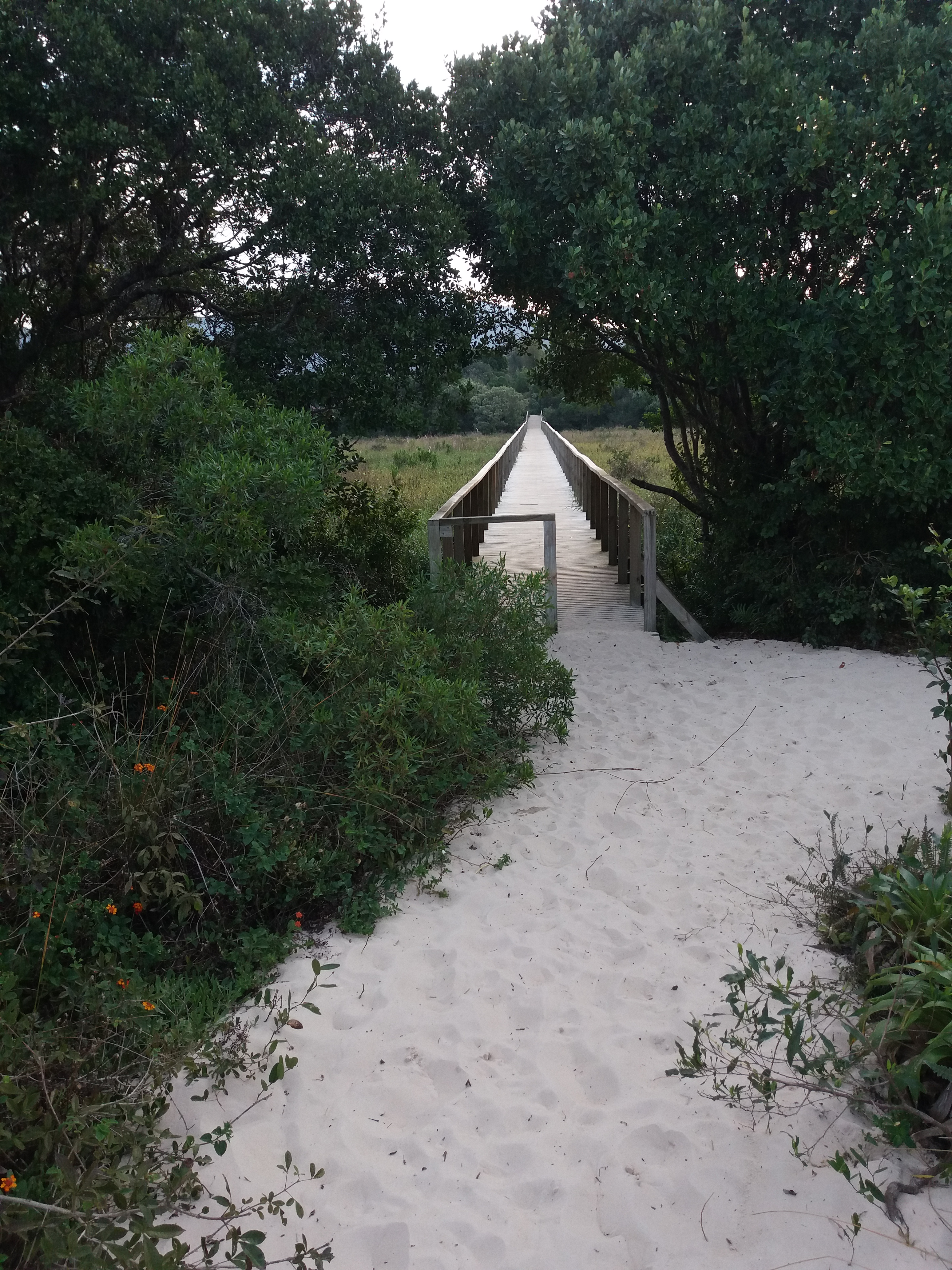 Florianópolis, Santa Catarina Ponte da trilha para a Praia do Moçambique no Rio Vermelho, 2018